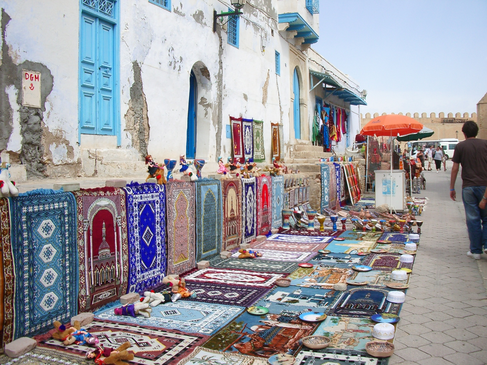 Medina de Kairouan